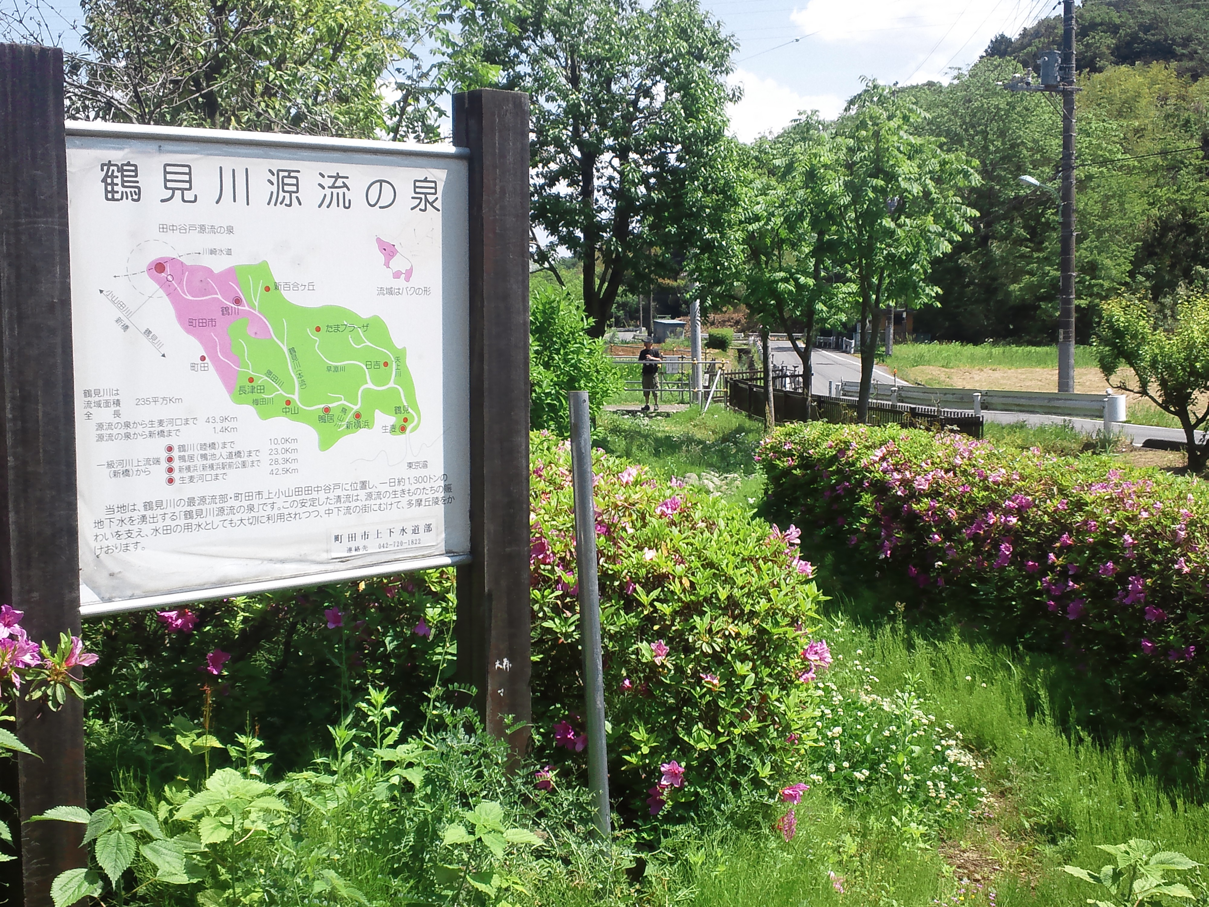 鶴見川源流の泉（町田市上小山田町）